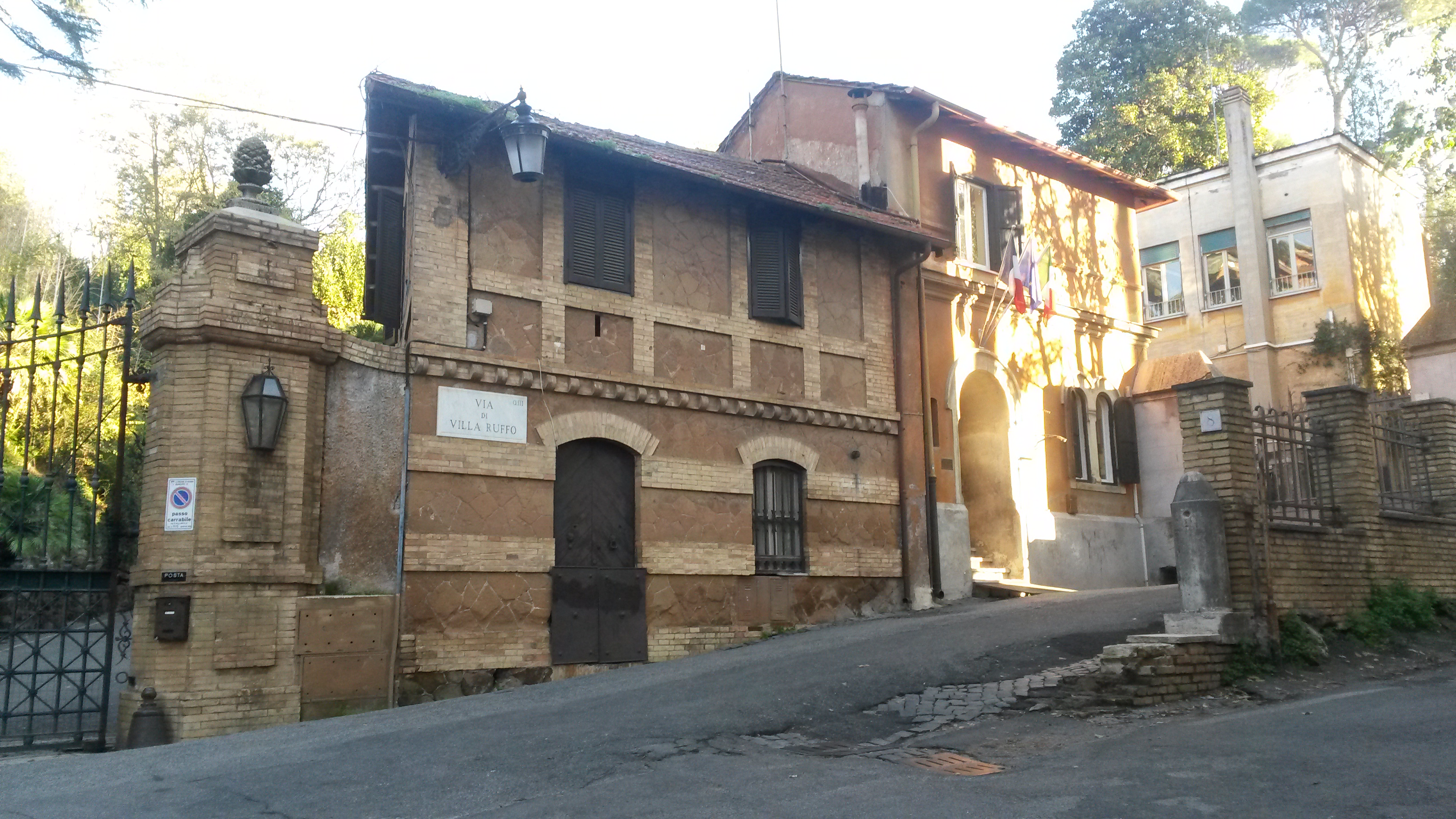 Villa Strohl-Fern_ Lycée français Chateaubriand de Rome - Petite Porte - Via di Villa Ruffo